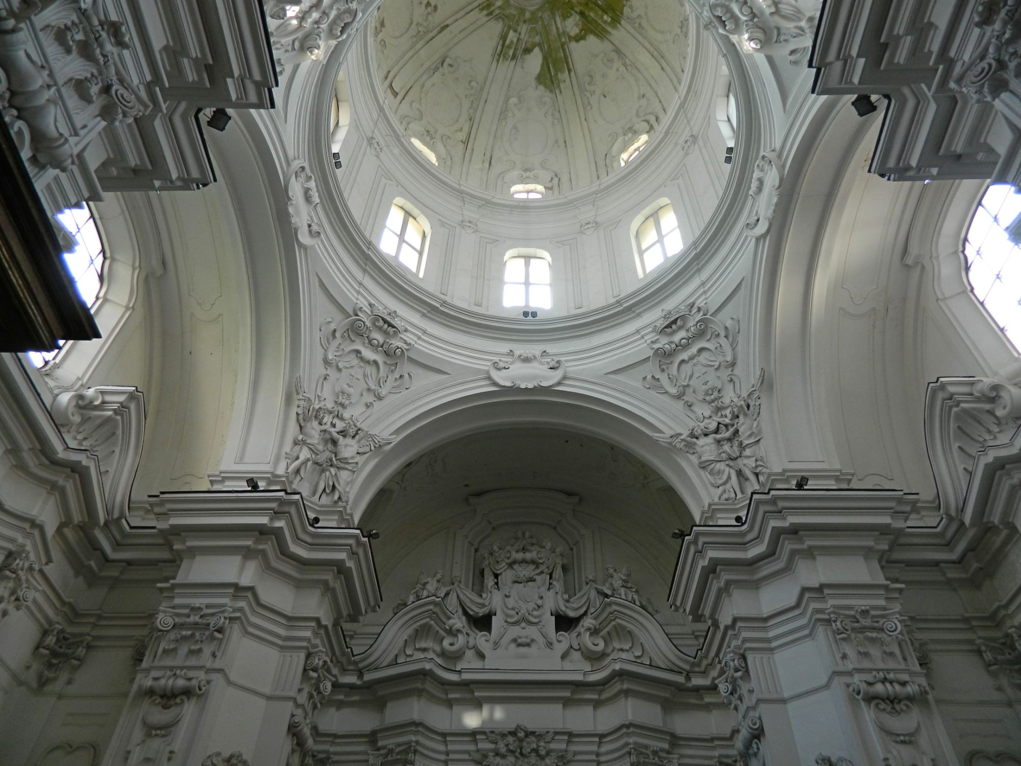 Chiesa di Santa Maria della Pace (Napoli) - Cupola